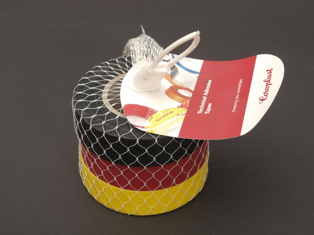 Textilklebebänder von Coroplast Fritz Müller GmbH & Co. KG Wuppertal